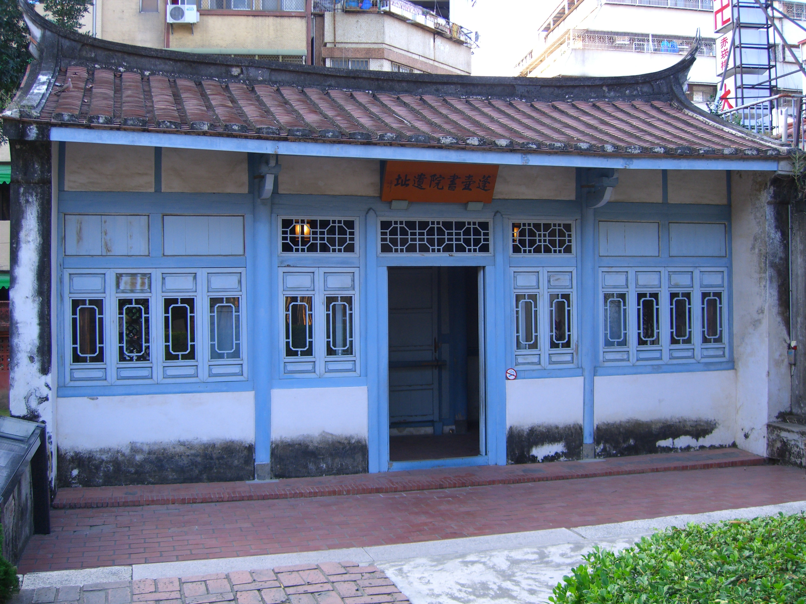 蓬壺書院遺址